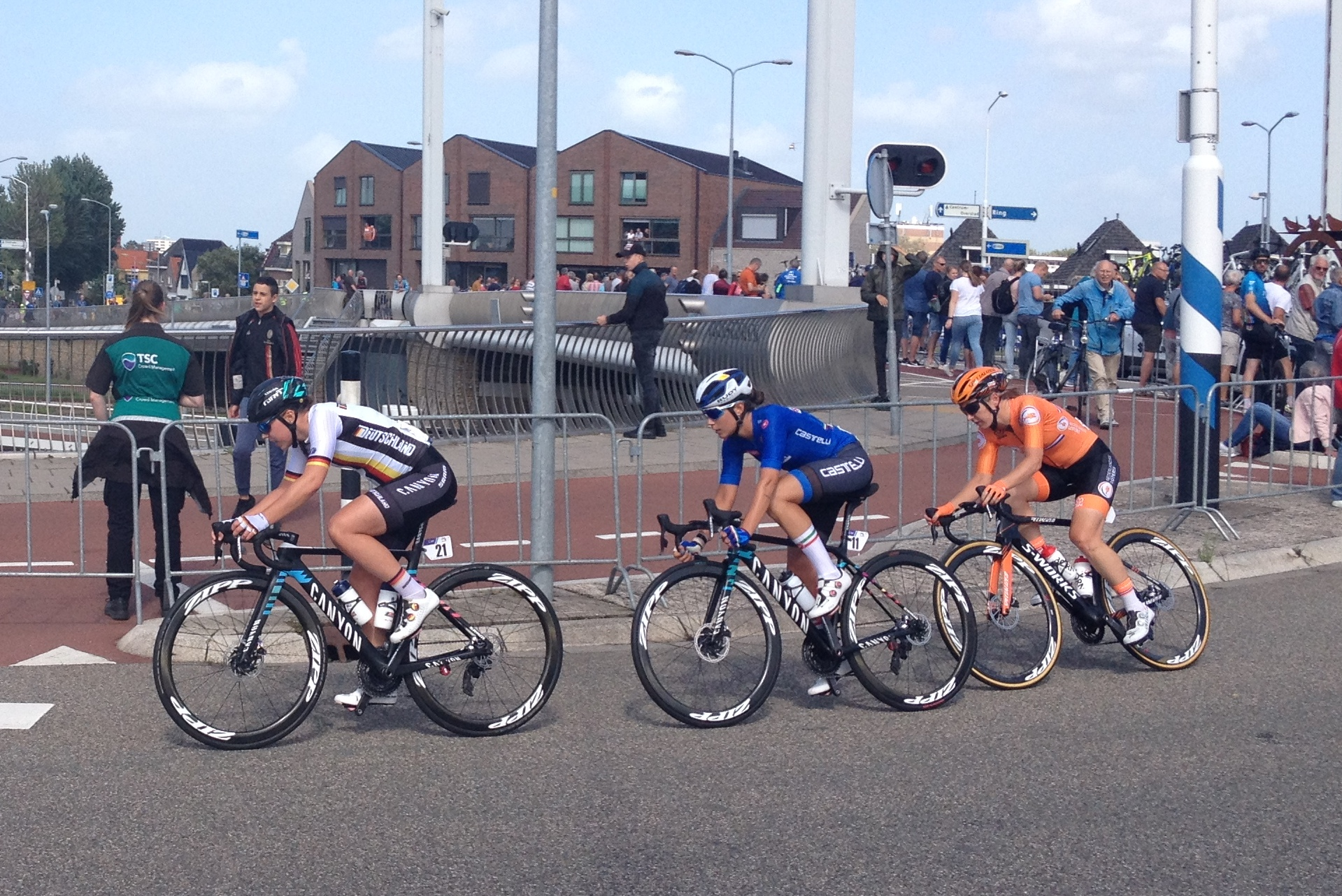 Wegwedstrijd voor vrouwen elite tijdens de Europese kampioenschappen wielrennen in Alkmaar op zaterdag 10 augustus 2019.